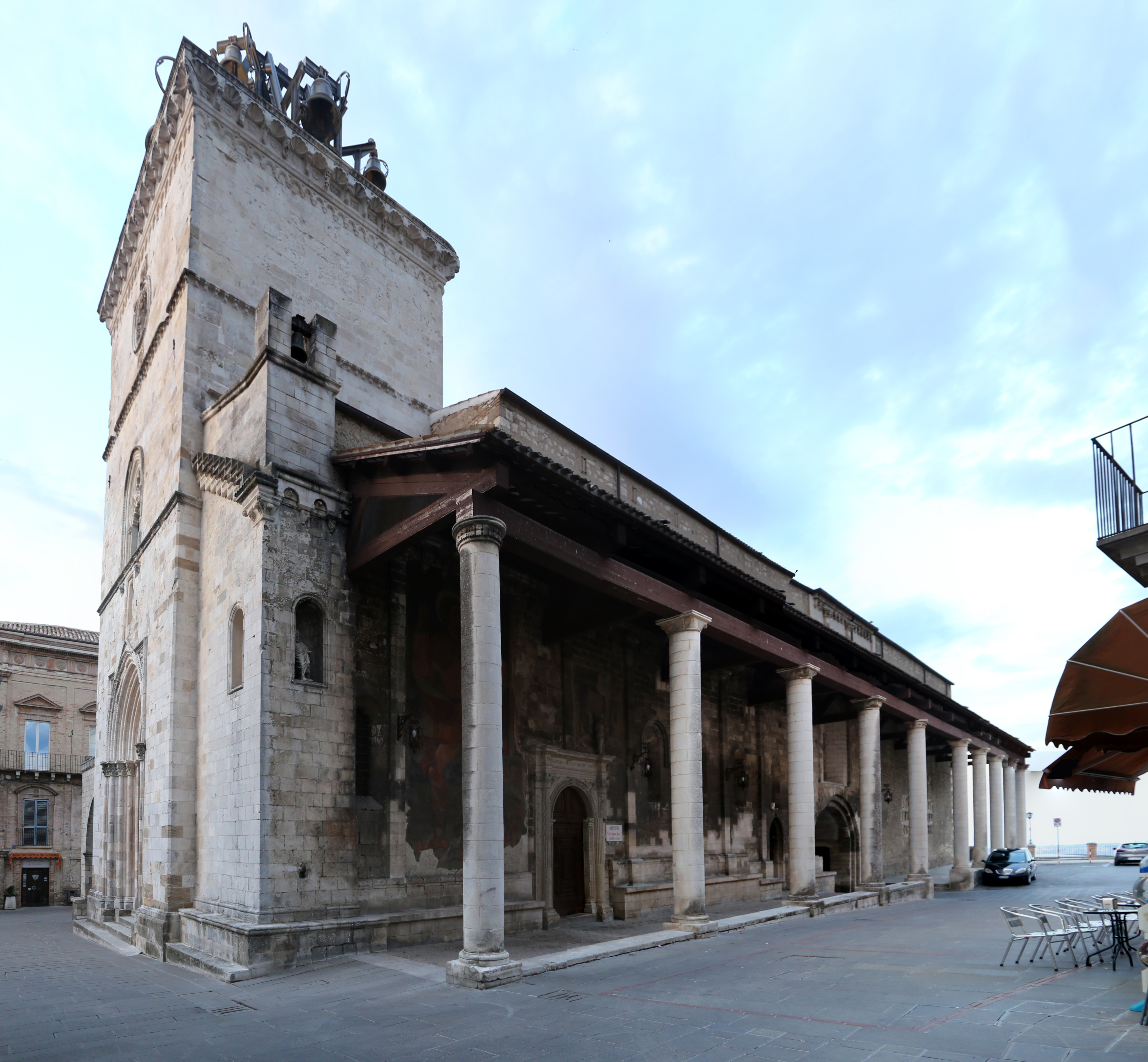 Piazza Santa Maria Maggiore This is a photo of a monument which is part of cultural heritage of Italy.